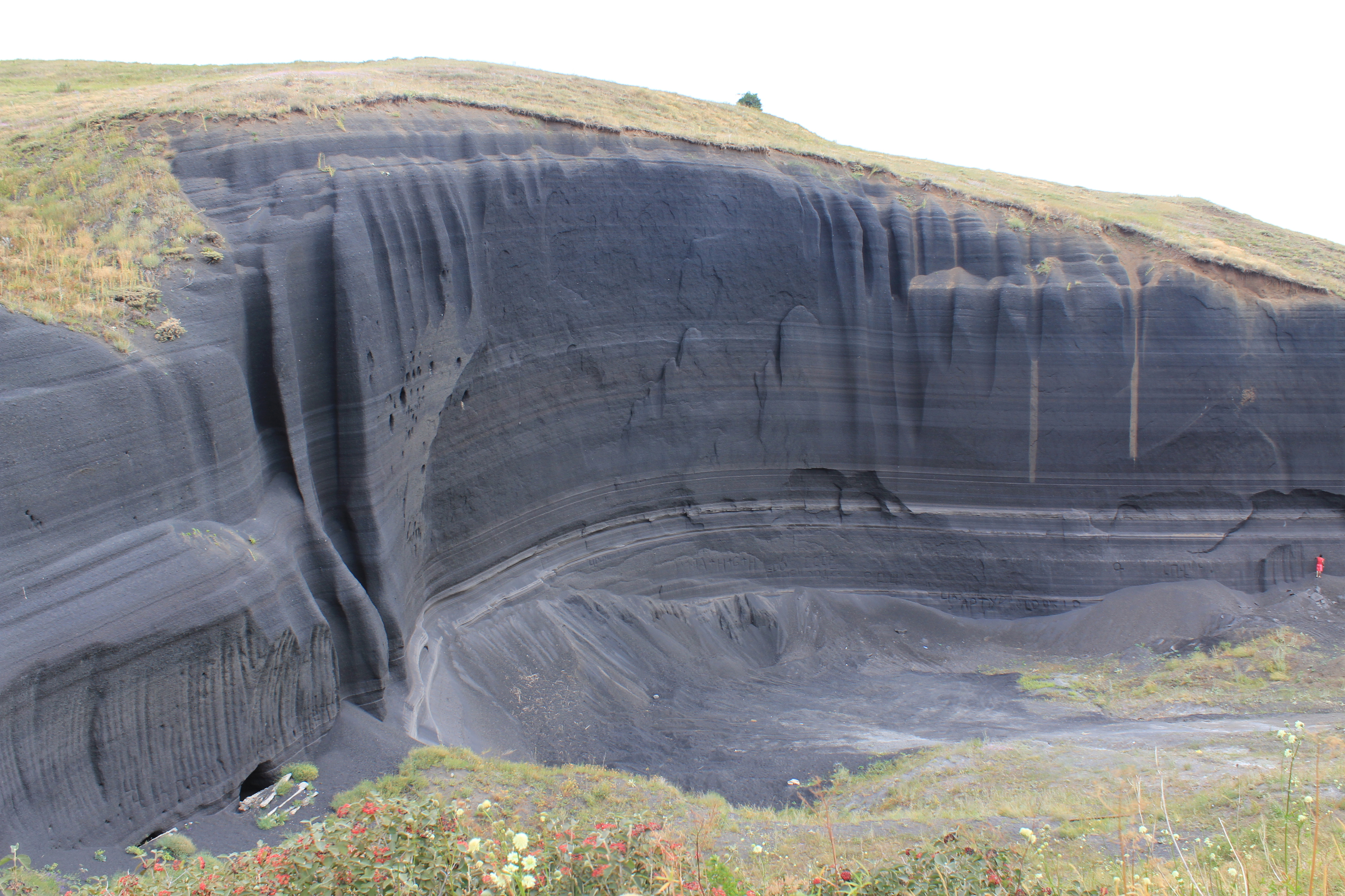 Лава вулкана Гутанасар близ села Фантан. Котайкский марз Армении